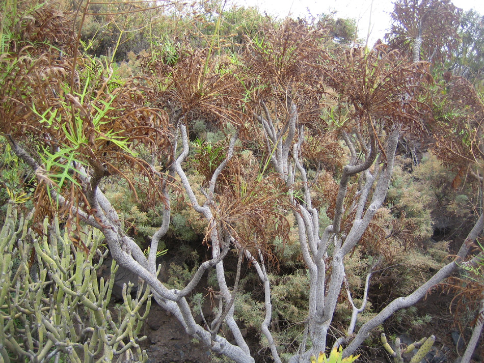 Sonchus gandogeri. Cerrajón de la Isla de El Hierro.